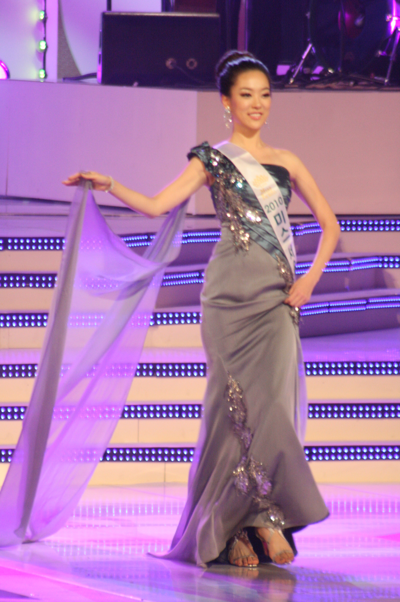 2010 미스코리아 미 하현정(서울 미) 드레스 심사